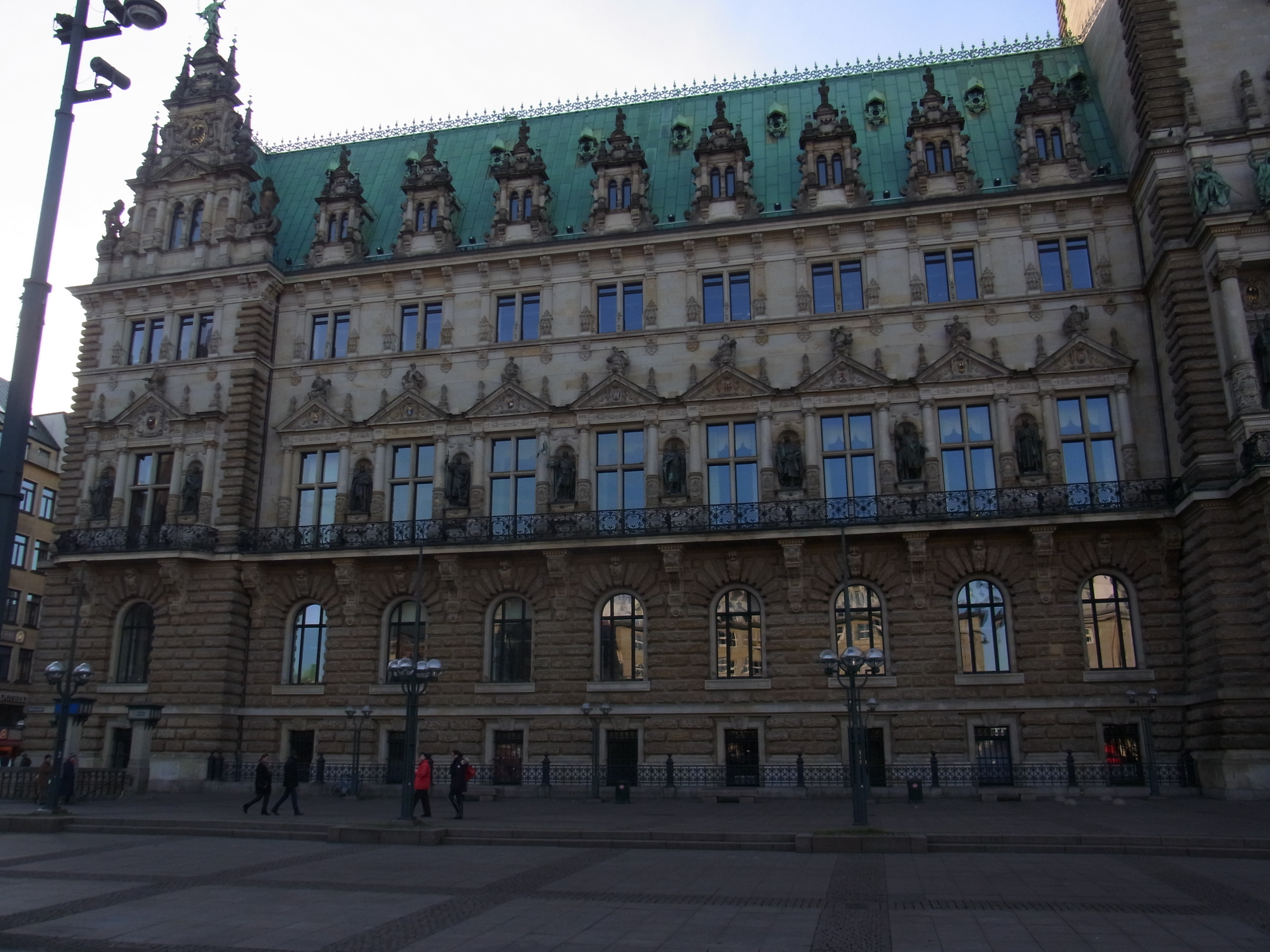 Hamburger Rathaus. Auf der Rathausmarktseite stehen zwischen den Fensternischen zwanzig Könige und Kaiser des alten deutschen Reiches, von Karl dem Großen bis Franz II. Auf dieser Seite befinden sich die Räume der Bürgerschaft, des Hamburger Parlaments